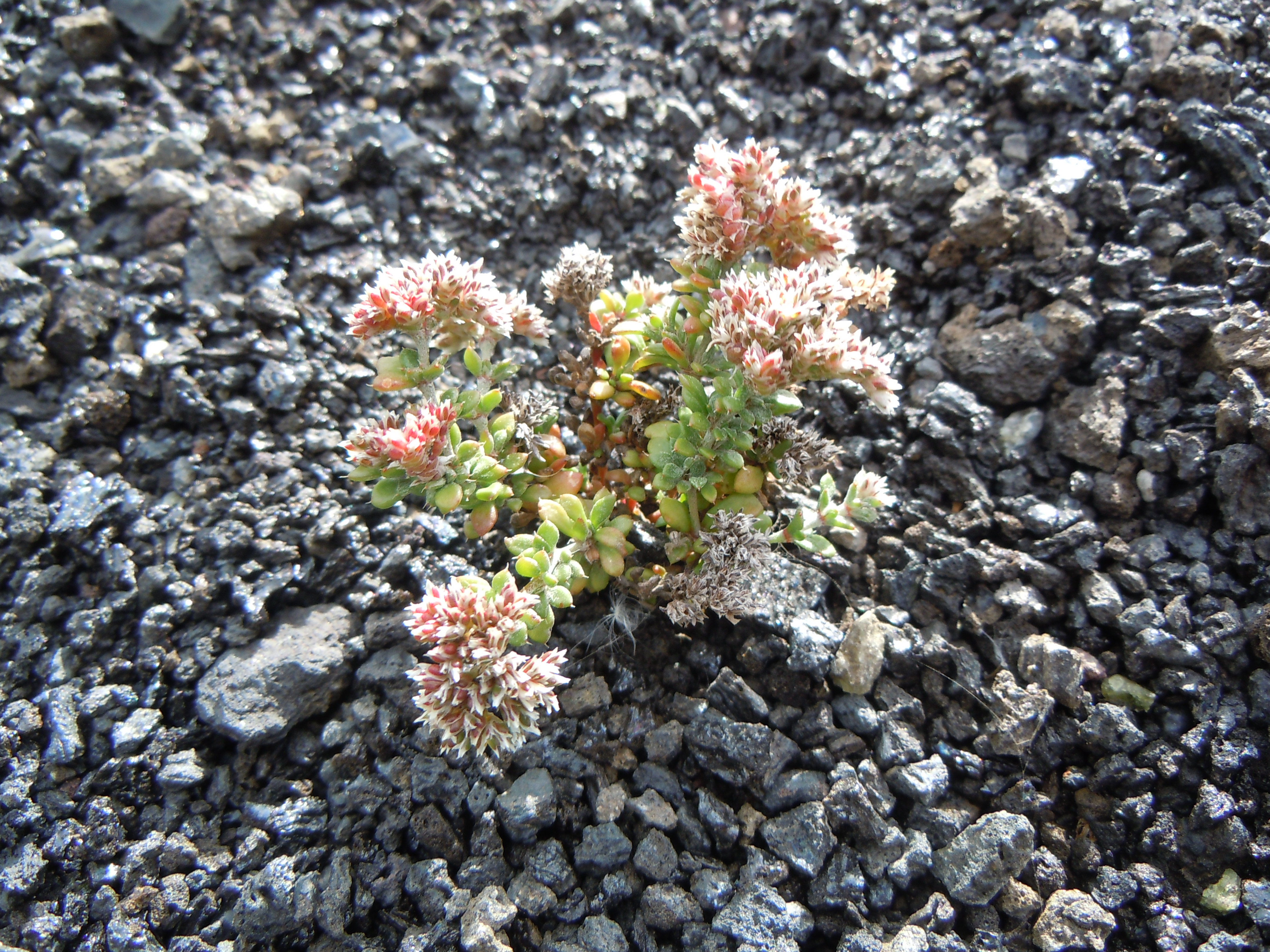 Polycarpaea divaricata Montana del Cuervo, Lanzarote